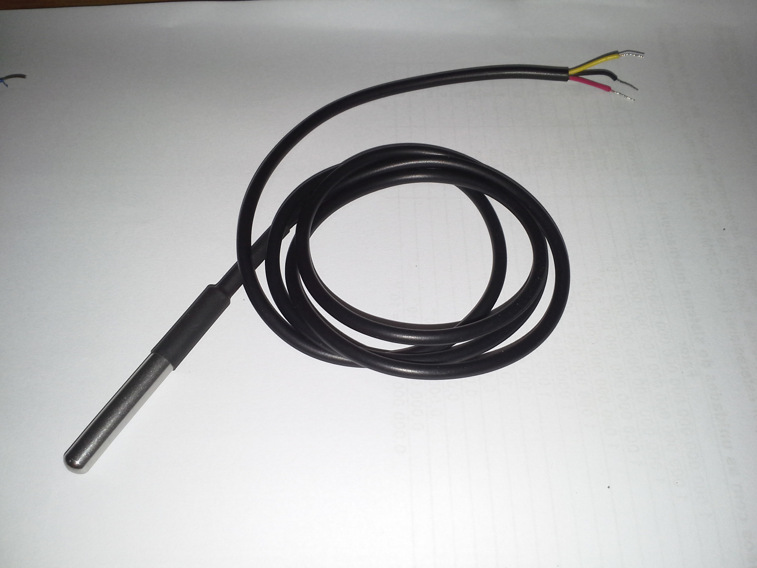 Foto do sensor DS18B20